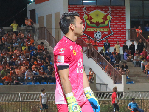 Sarawut Konglarp